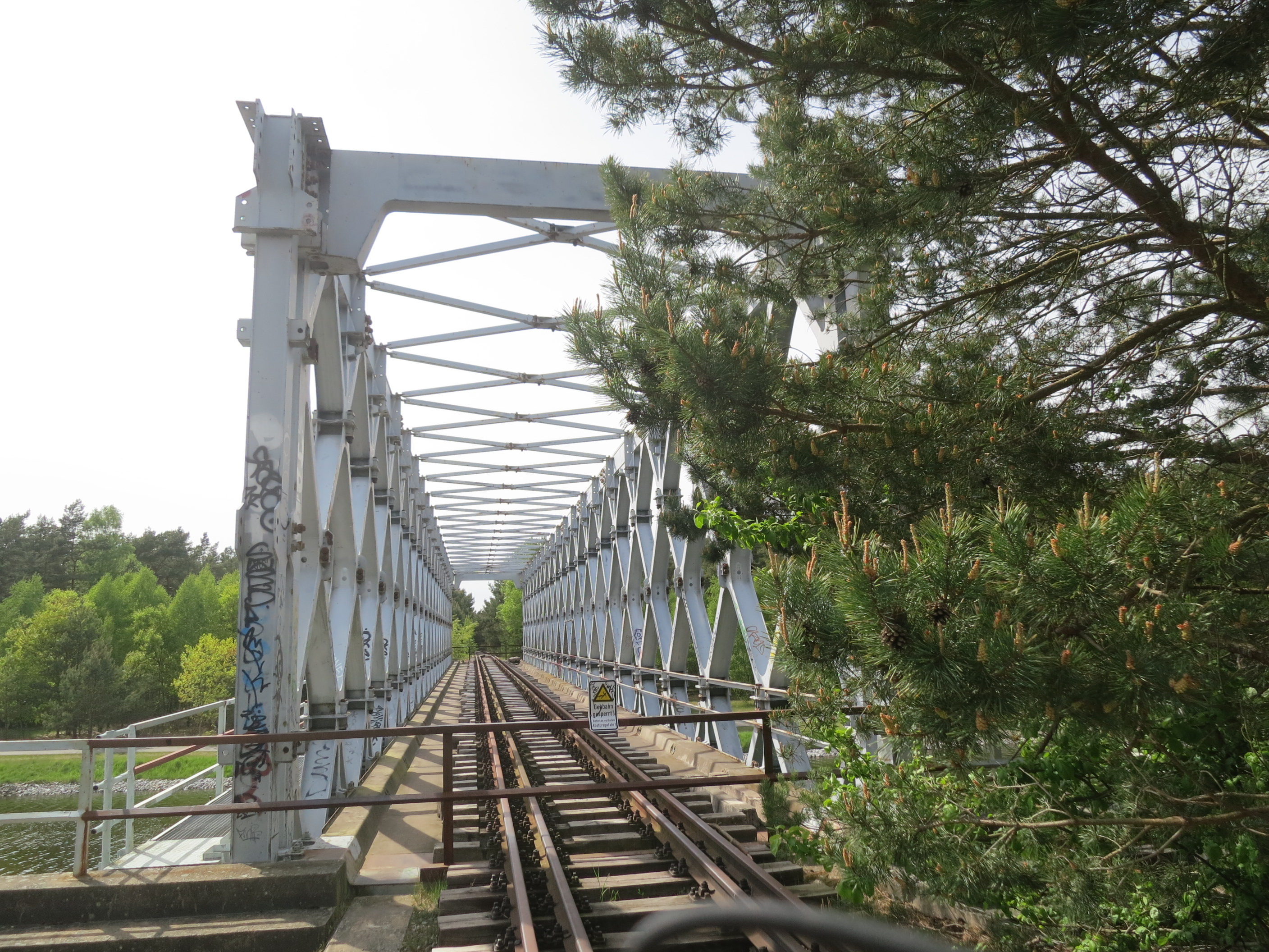 Klinkerhafenbrücke mit Gleis